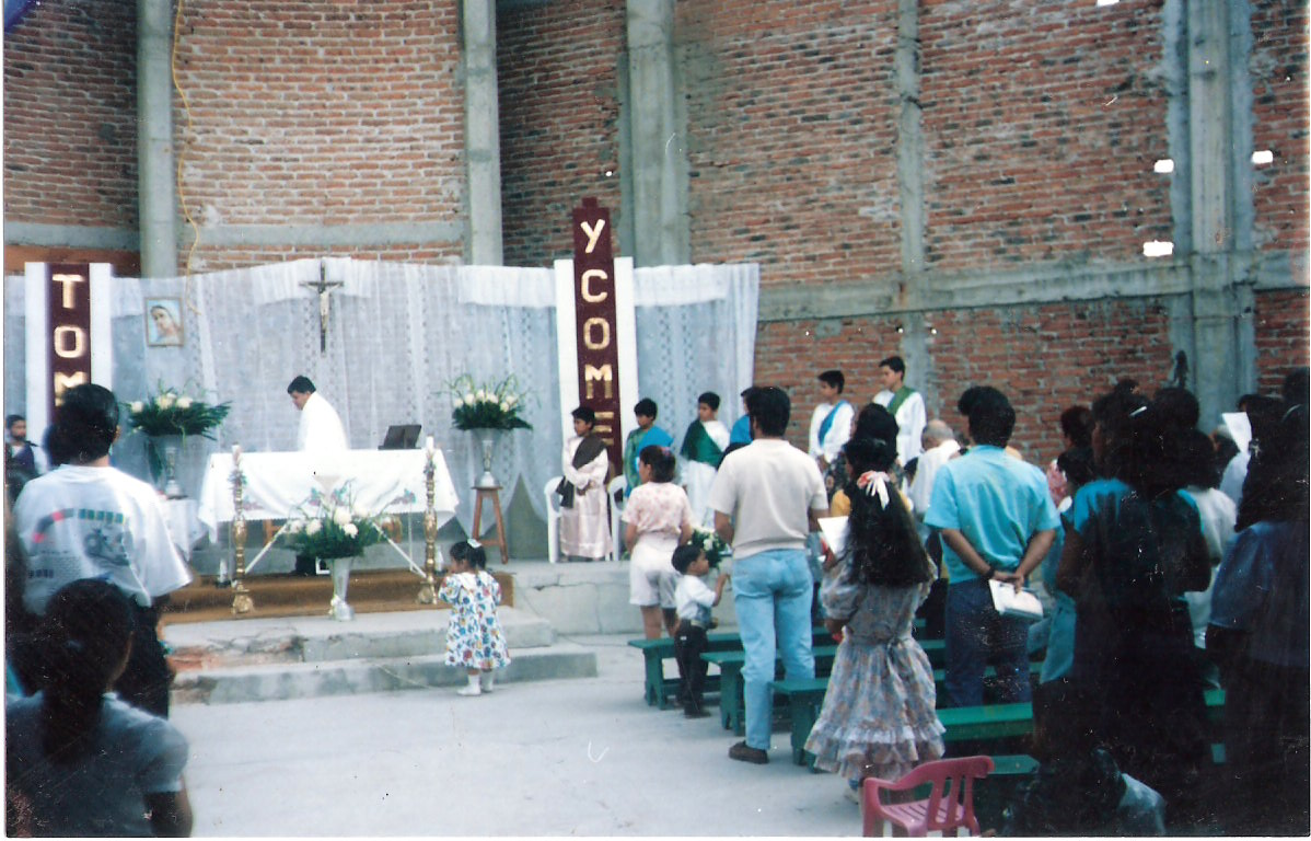 Primeras imágenes de la celebración en el templo, aún en construcción